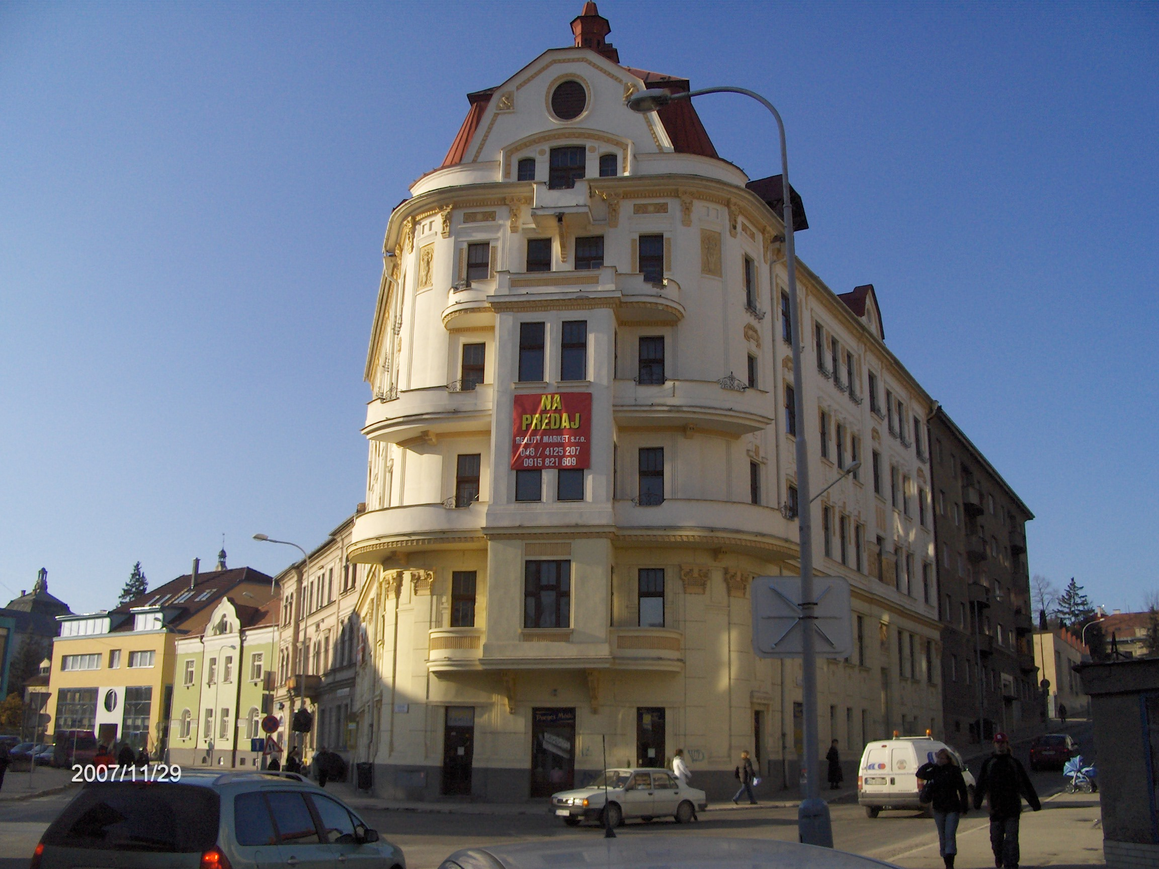 Палата Поргес.